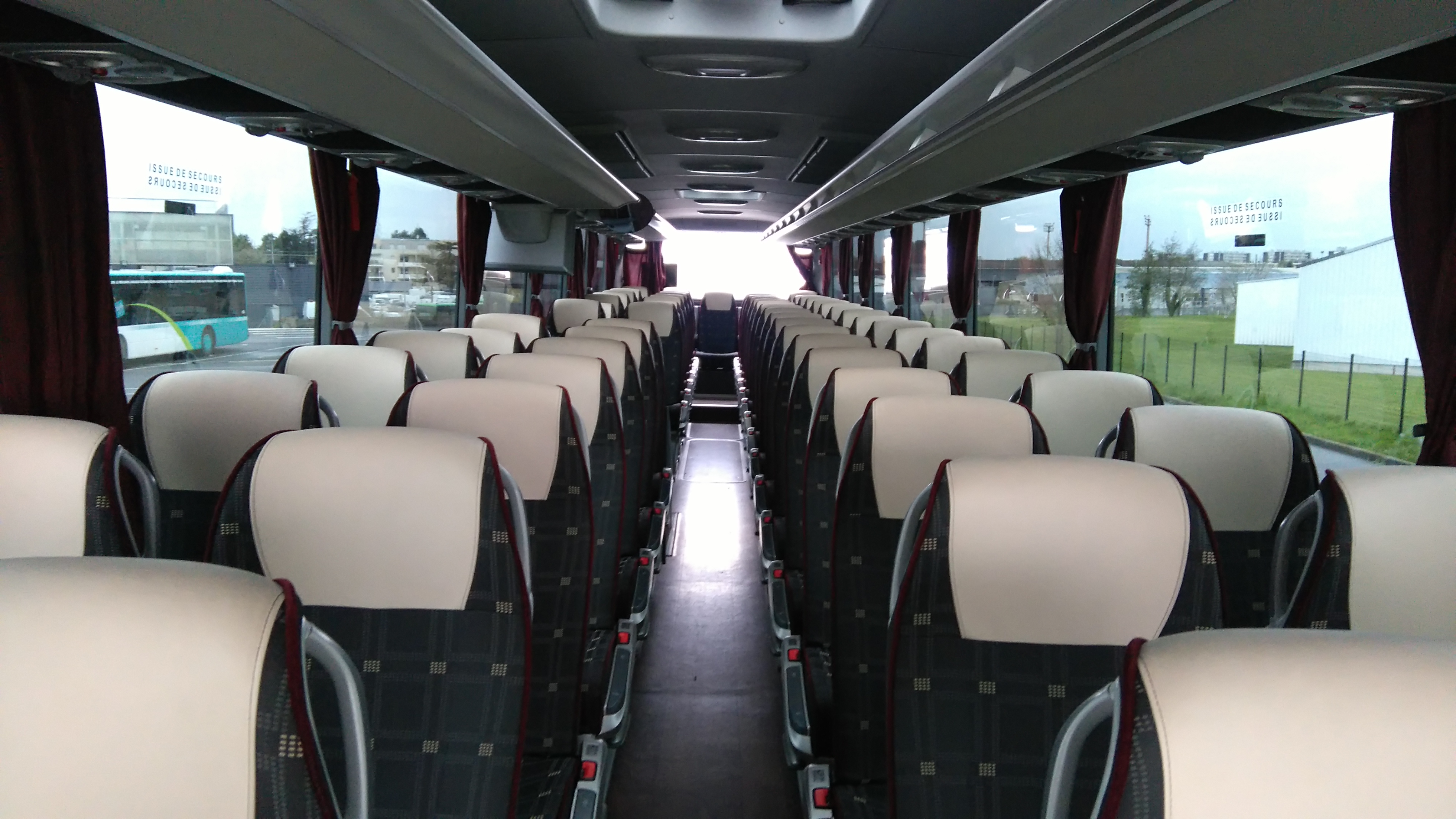 Mercedes-Benz O 350 Tourismo L 20th Anniversary - Intérieur